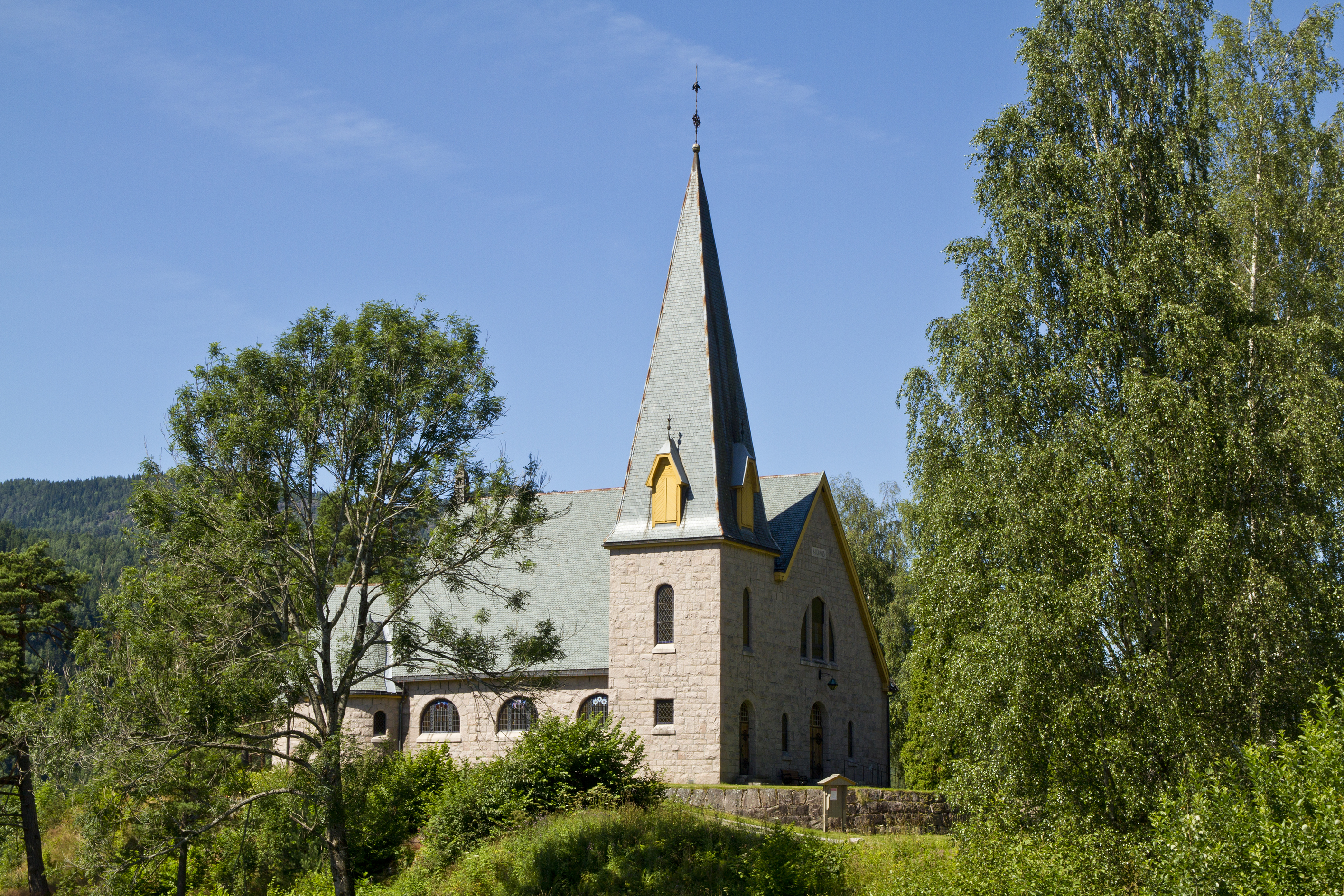 Kvitseid church